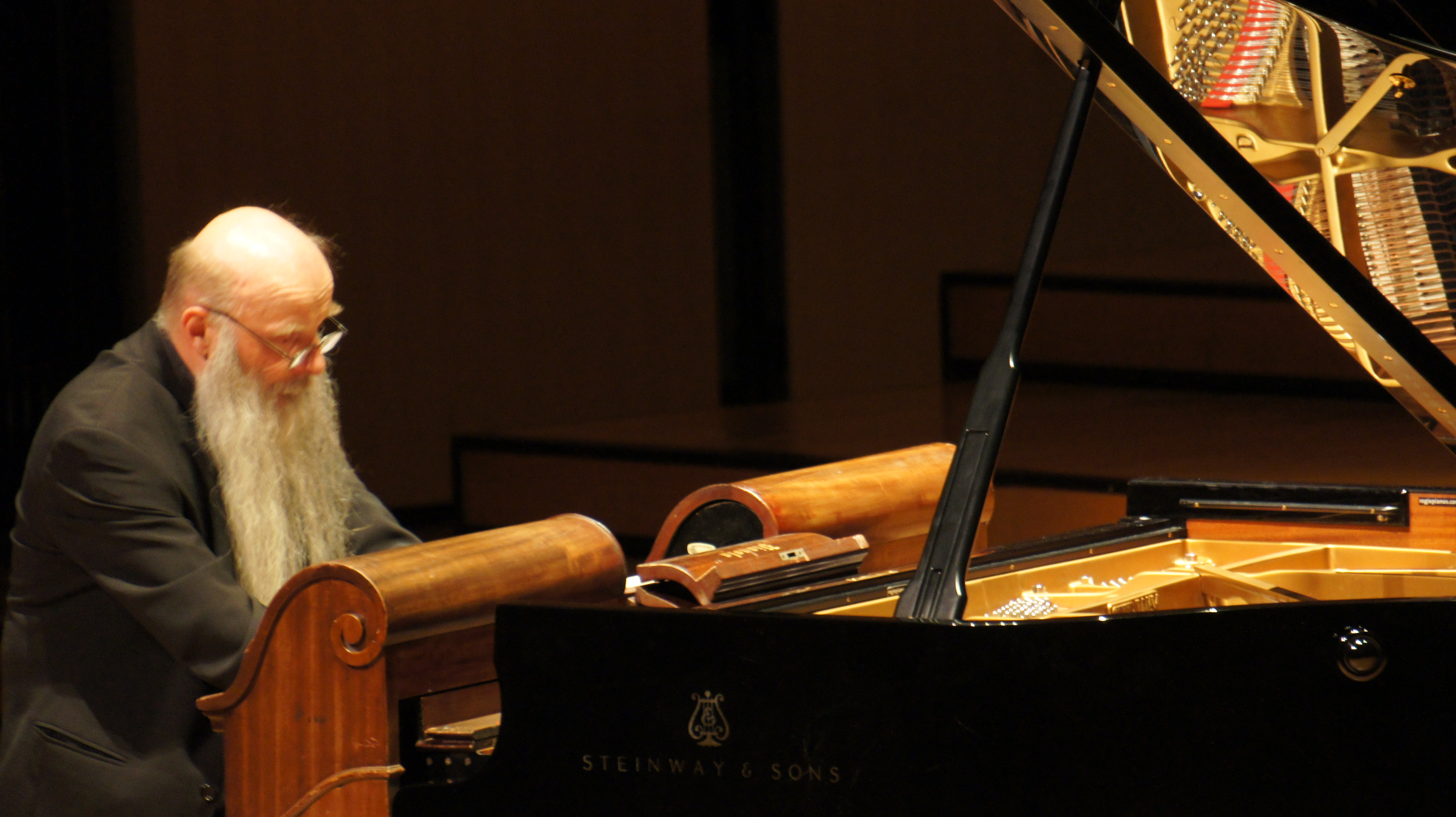 Flâneries musicales 2013 Rex Lawson jouant du pianola au concervatoire de Reims .